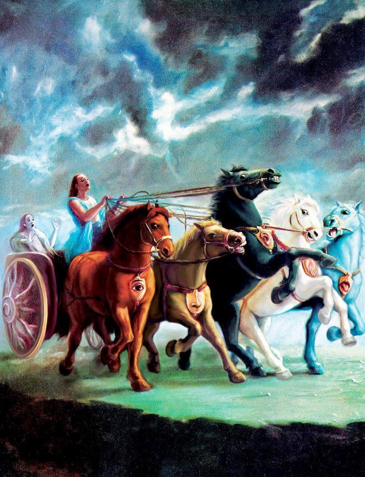 He is in a chariot with five horses. ... The chariot of the body. The five horses represent the five senses (tongue, eyes, ears, nose and skin). The reins, the driving instrument, symbolize the mind, the driver is the intelligence, and the passenger is the spirit soul.